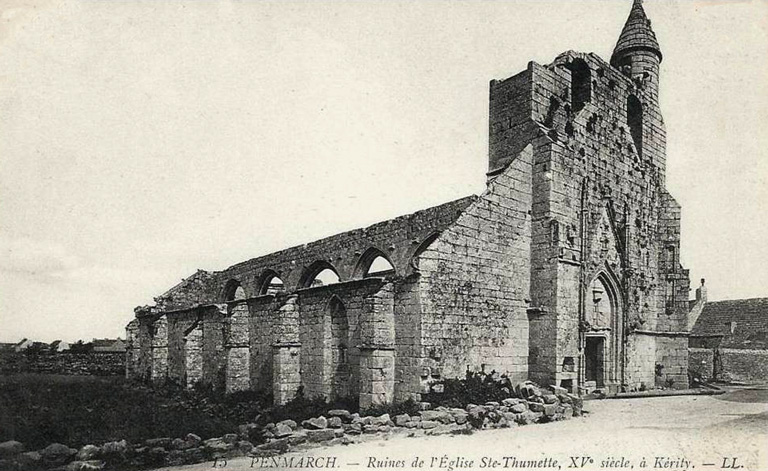 Penmarch : l'église Sainte-Thumette de Kérity, en ruines ; sa toiture et sa charpente s'écroulèrent en 1808 (carte postale datant approximativement de 1900). Classée monument historique en février 1916, elle fut restaurée entre 1949 et 1951, redevenant l'église paroissiale de Kérity.